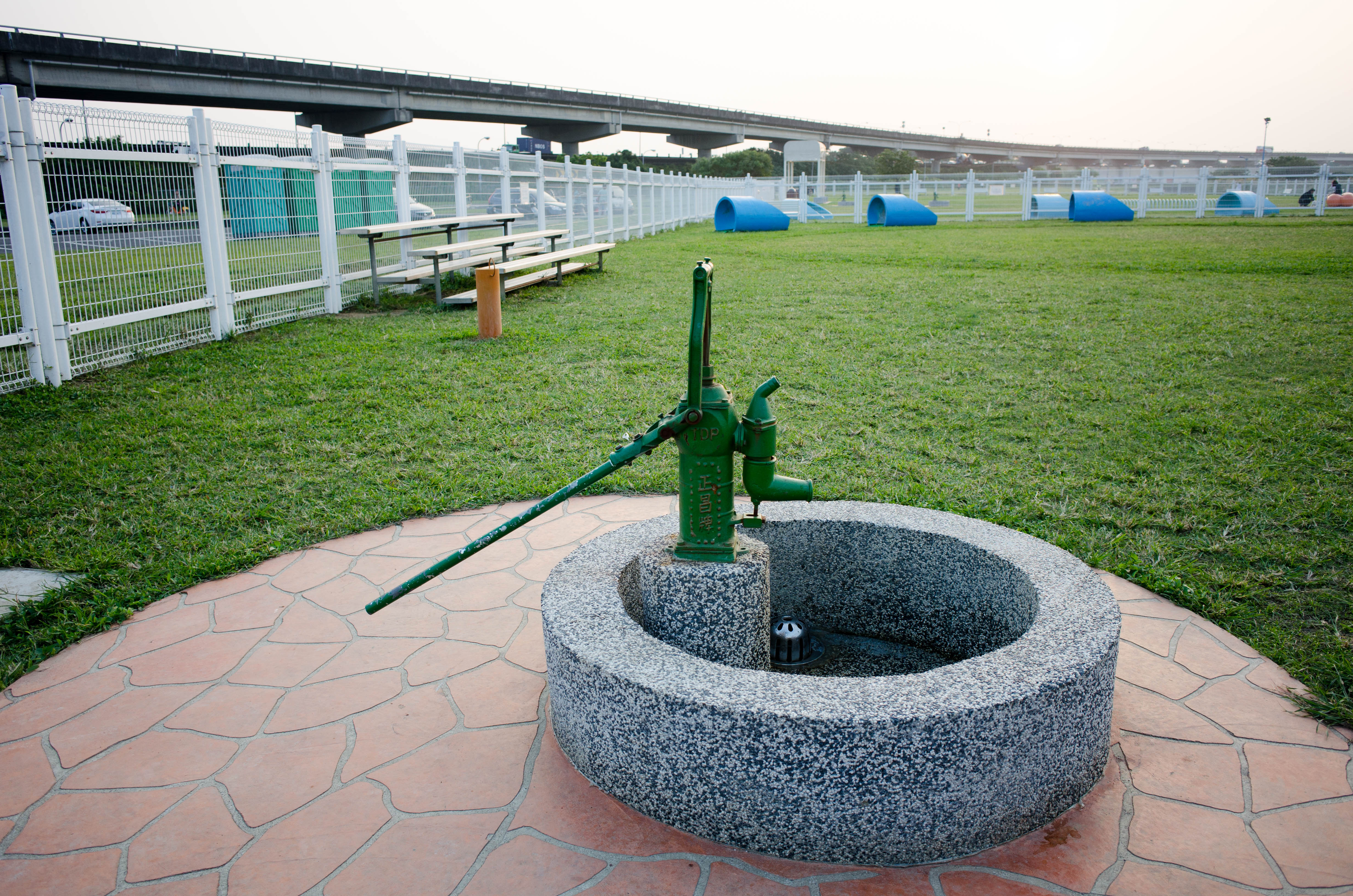 中文（台灣）: 臺北市松山區迎風河濱公園內迎風狗運動公園，入口左右設置的兩座抽水唧筒之一。